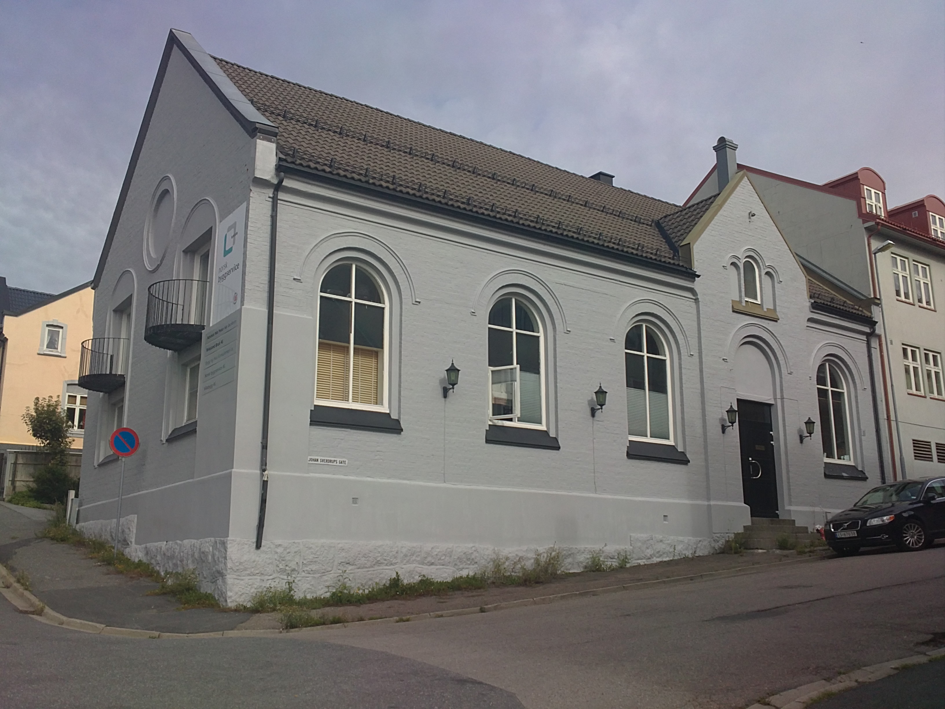 Bilde av den tidlgere Frikirken i Larvik